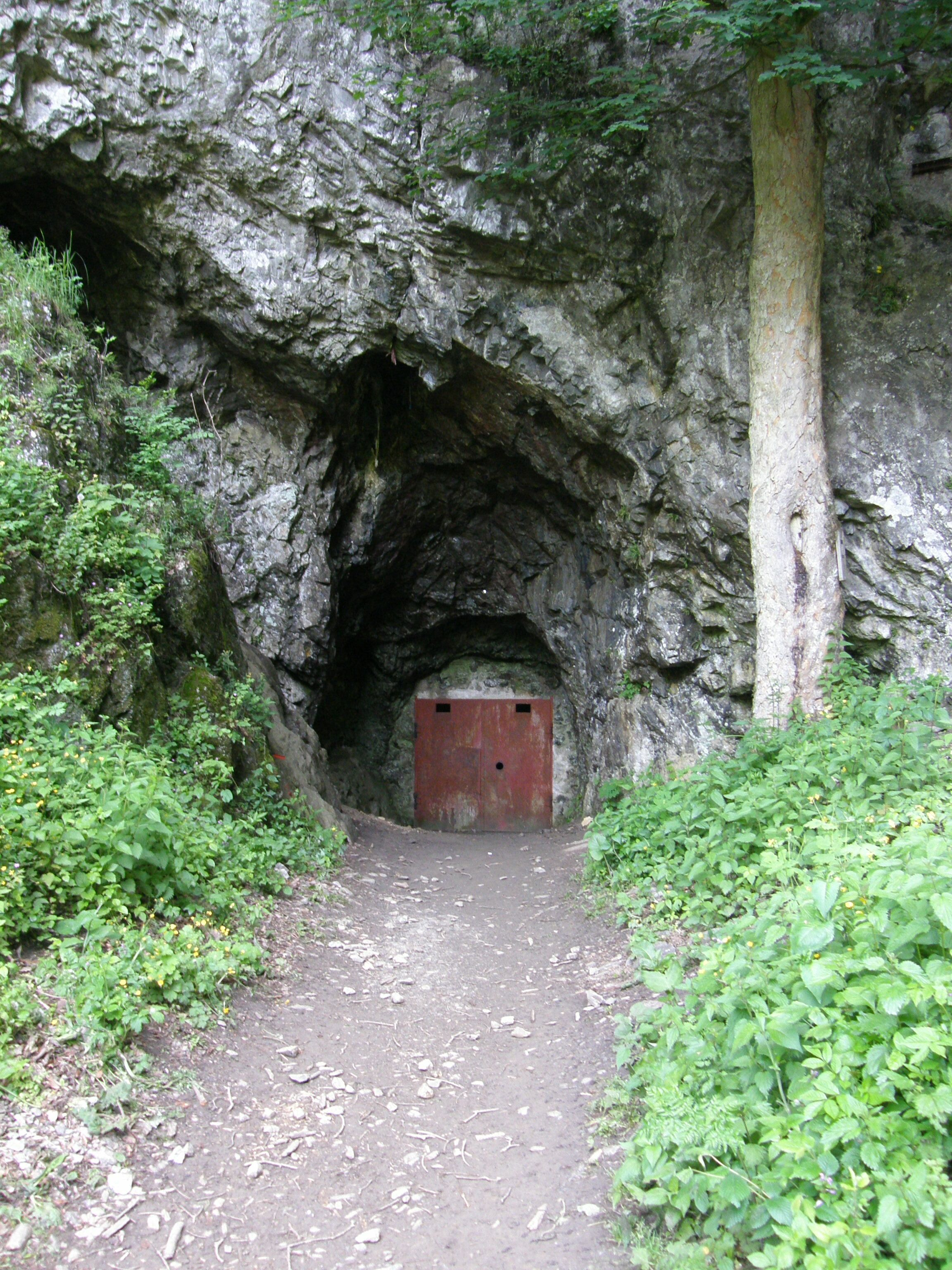 Vchod do Býčí skály